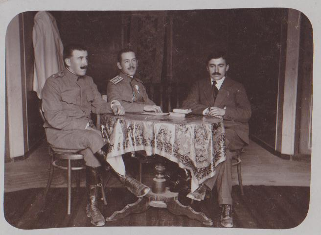 Кметът на Крушево, Наум Томалевски, подполковник Ал. Ганчев и Григор Календеров през 1917 г.